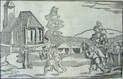 Pohřeb Vladislava Jagellonského